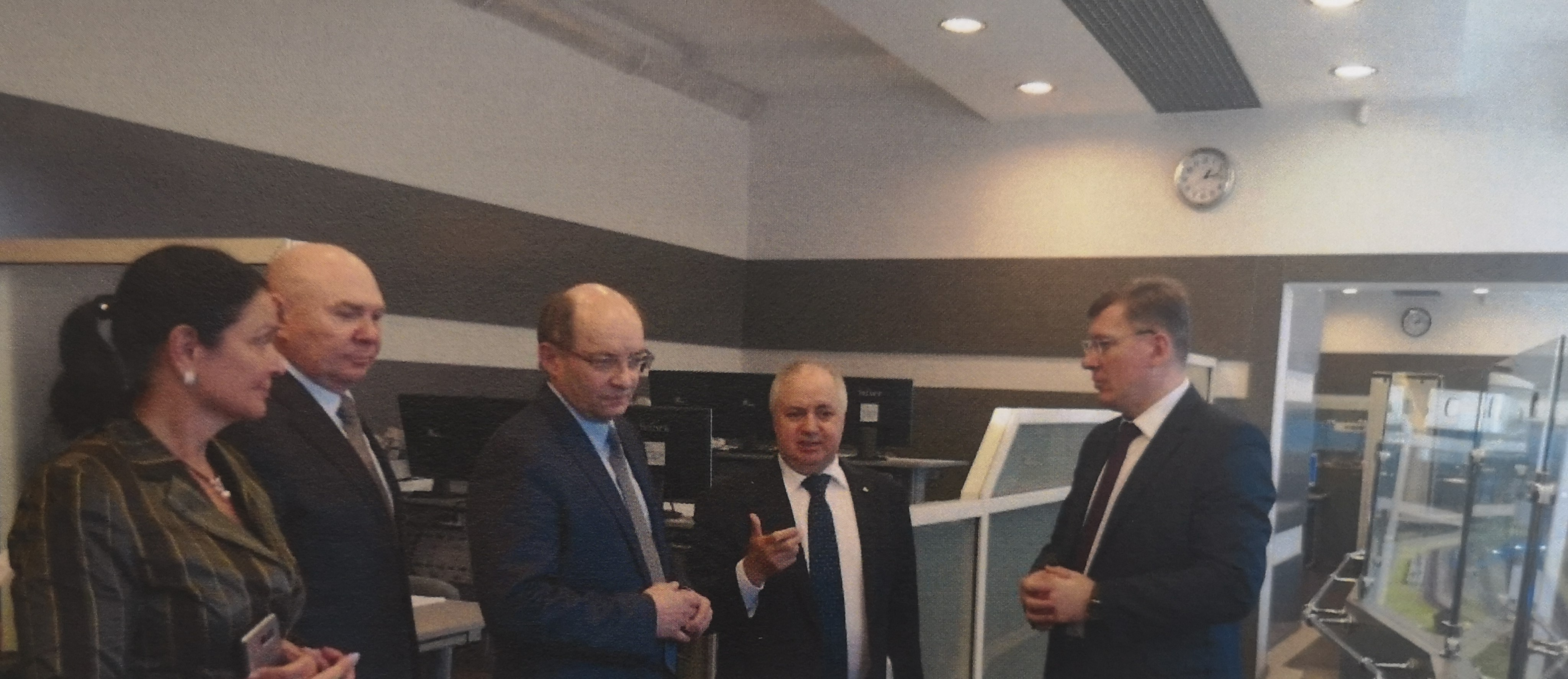 На фото справа налево: Панычев а.ю.,Киселев и.п.,Мишарин а.с., Голоскоков в.н.,Титова т.с.